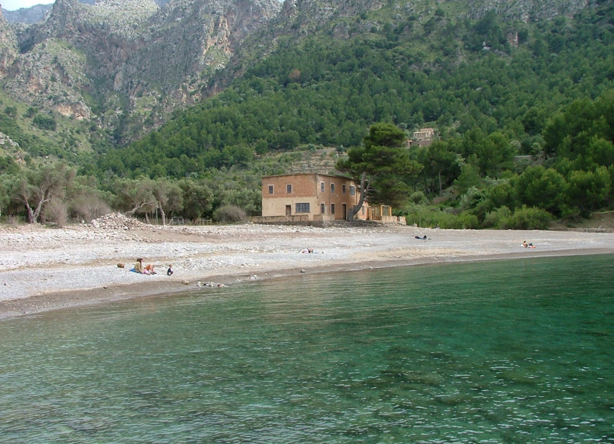 Cala Tuent, Mallorca, Spain